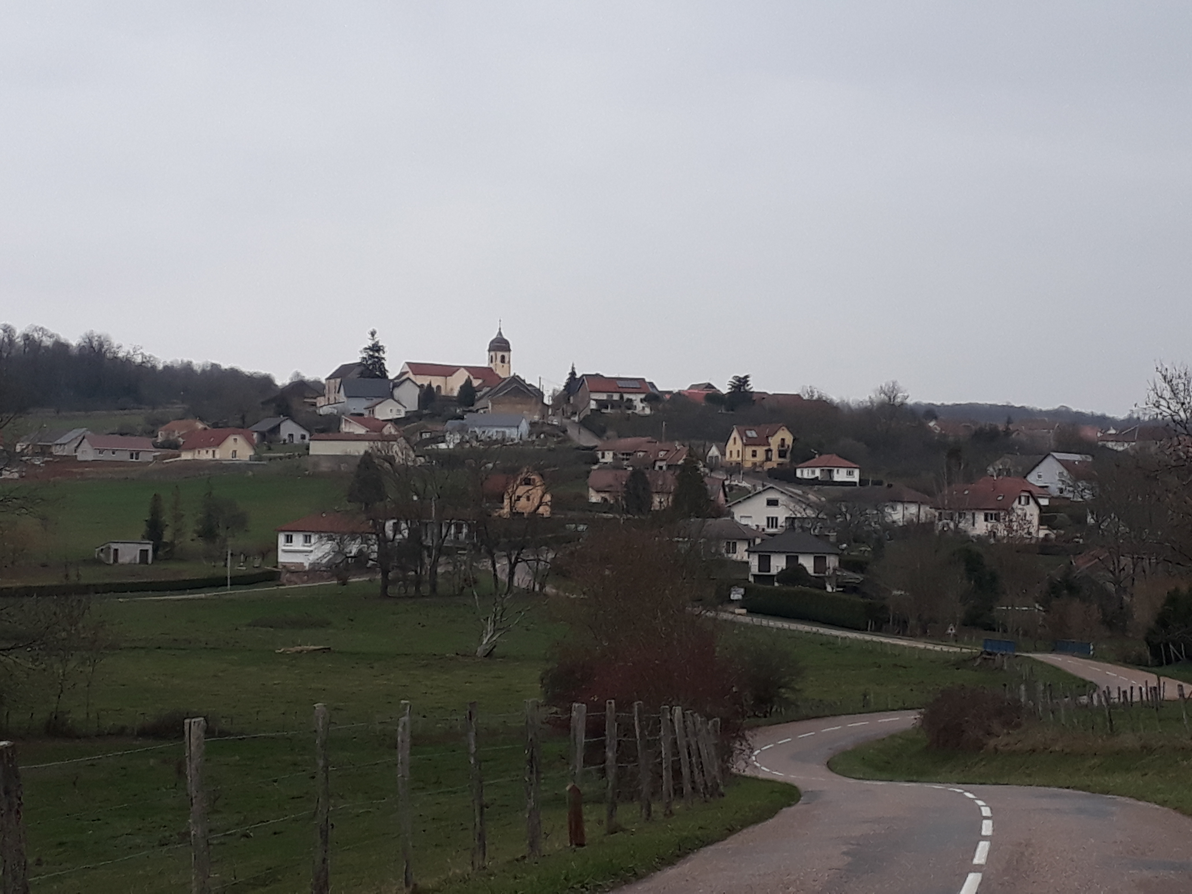 Fleurey-lès-Faverney